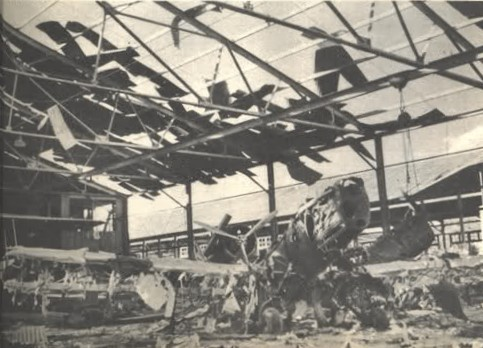 1940年10月26日雷允厂遭到日军轰炸后的厂房